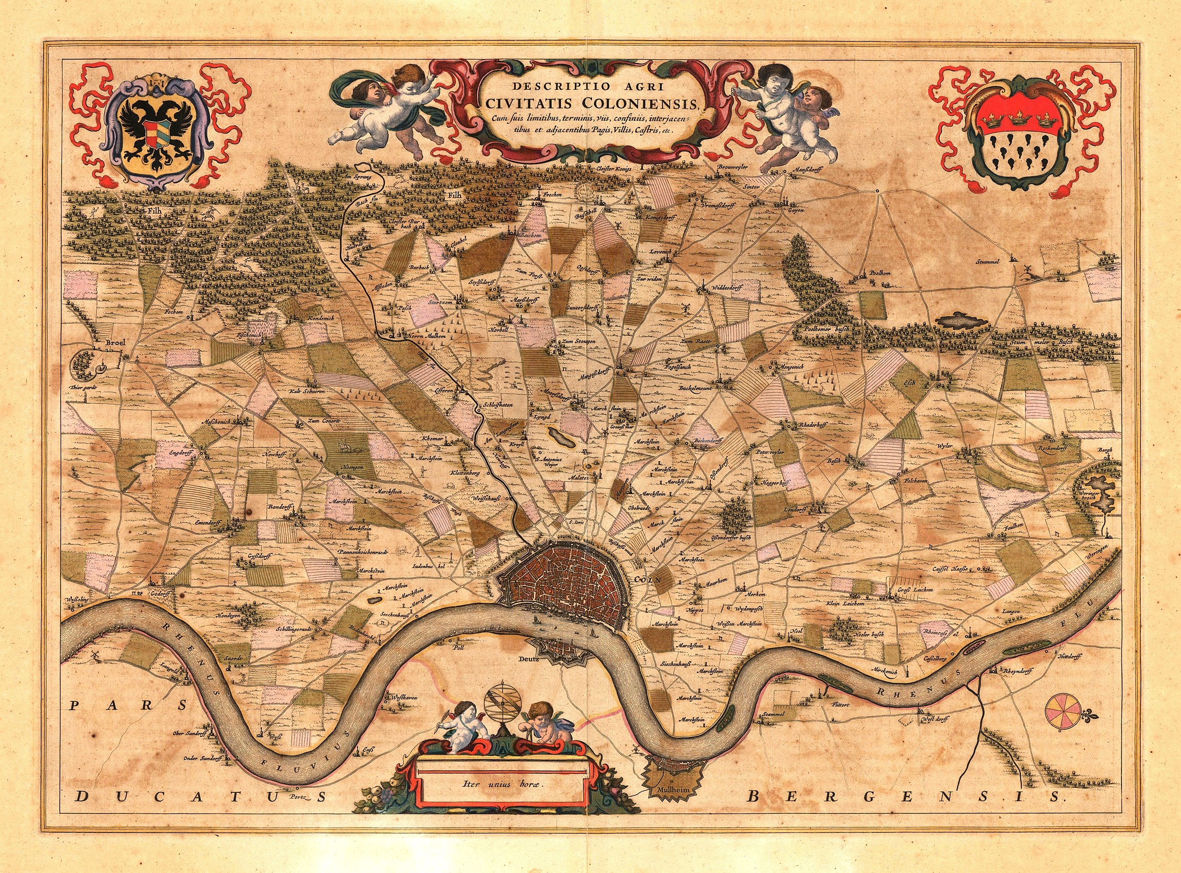 Kupferstich: Köln - Karte Joan Blaeu (1663)